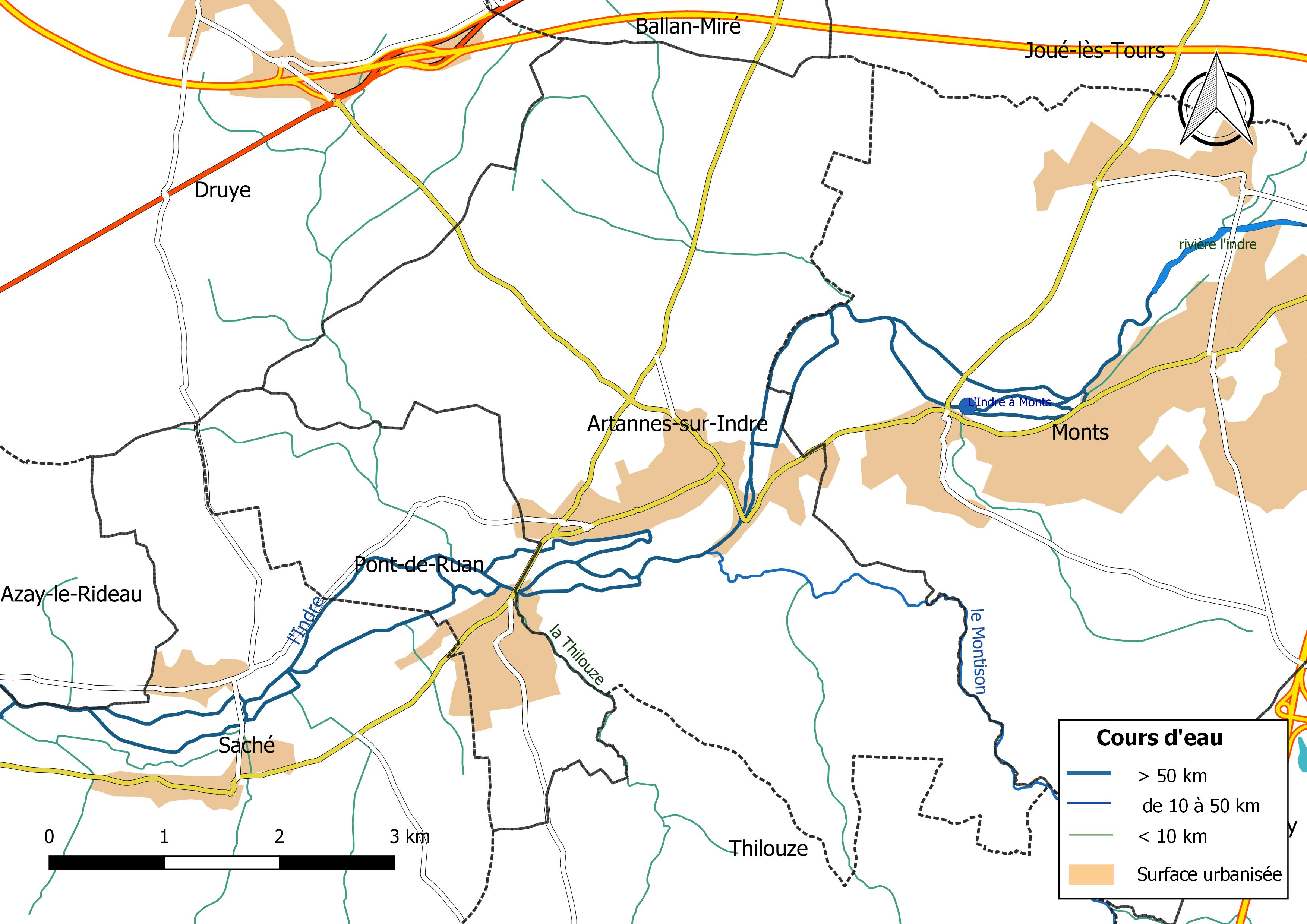 Carte du réseau hydrographique de la commune de Artannes-sur-Indre (France).